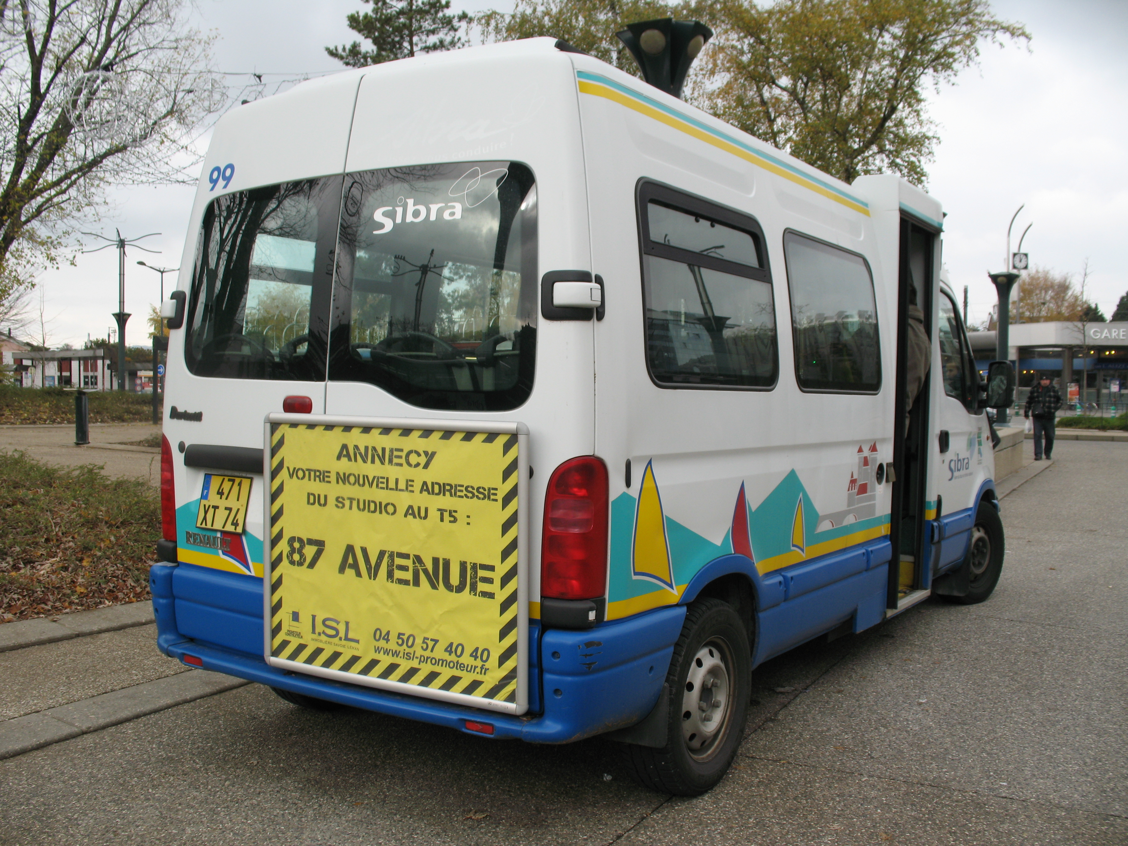 Minibus Renault Master du réseau Sibra à Annecy (74 France).